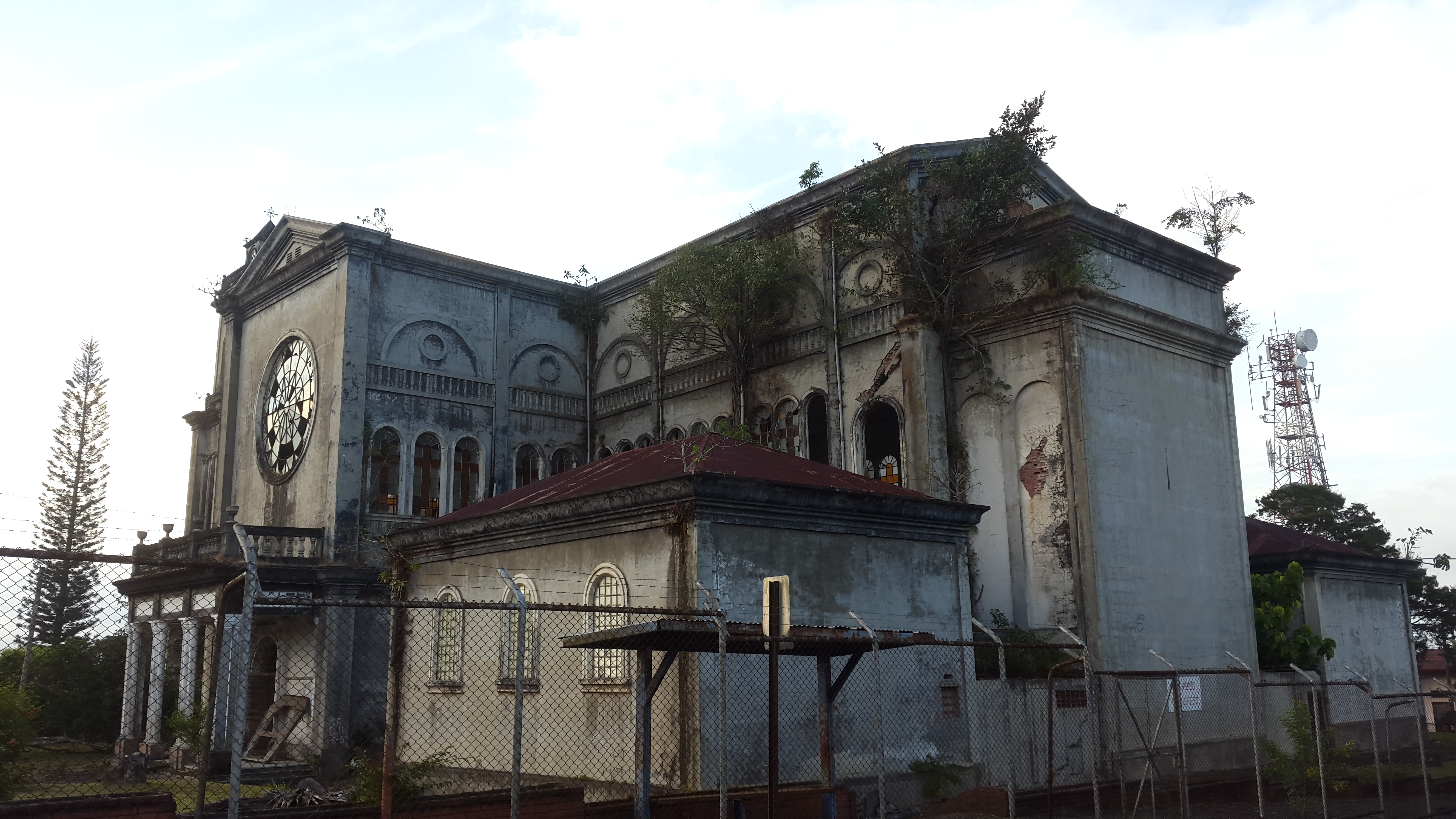 Antigua parroquia de Santiago de Puriscal, Costa Rica.